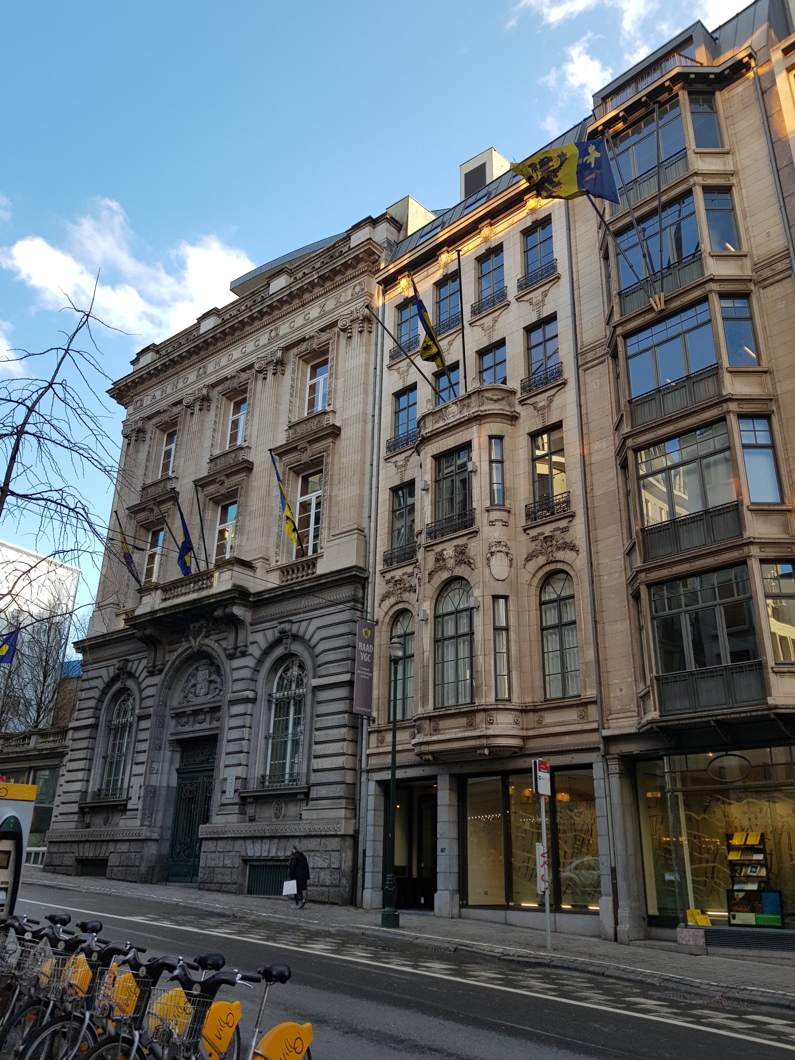 Lombardstraat 69 + 61-67, Brussel, België